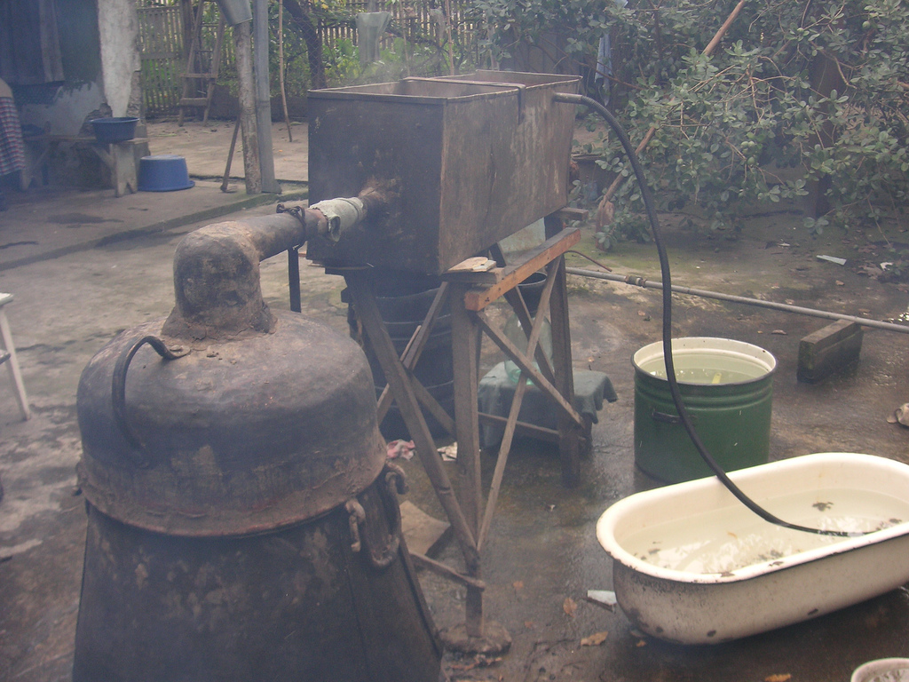 Making Chacha